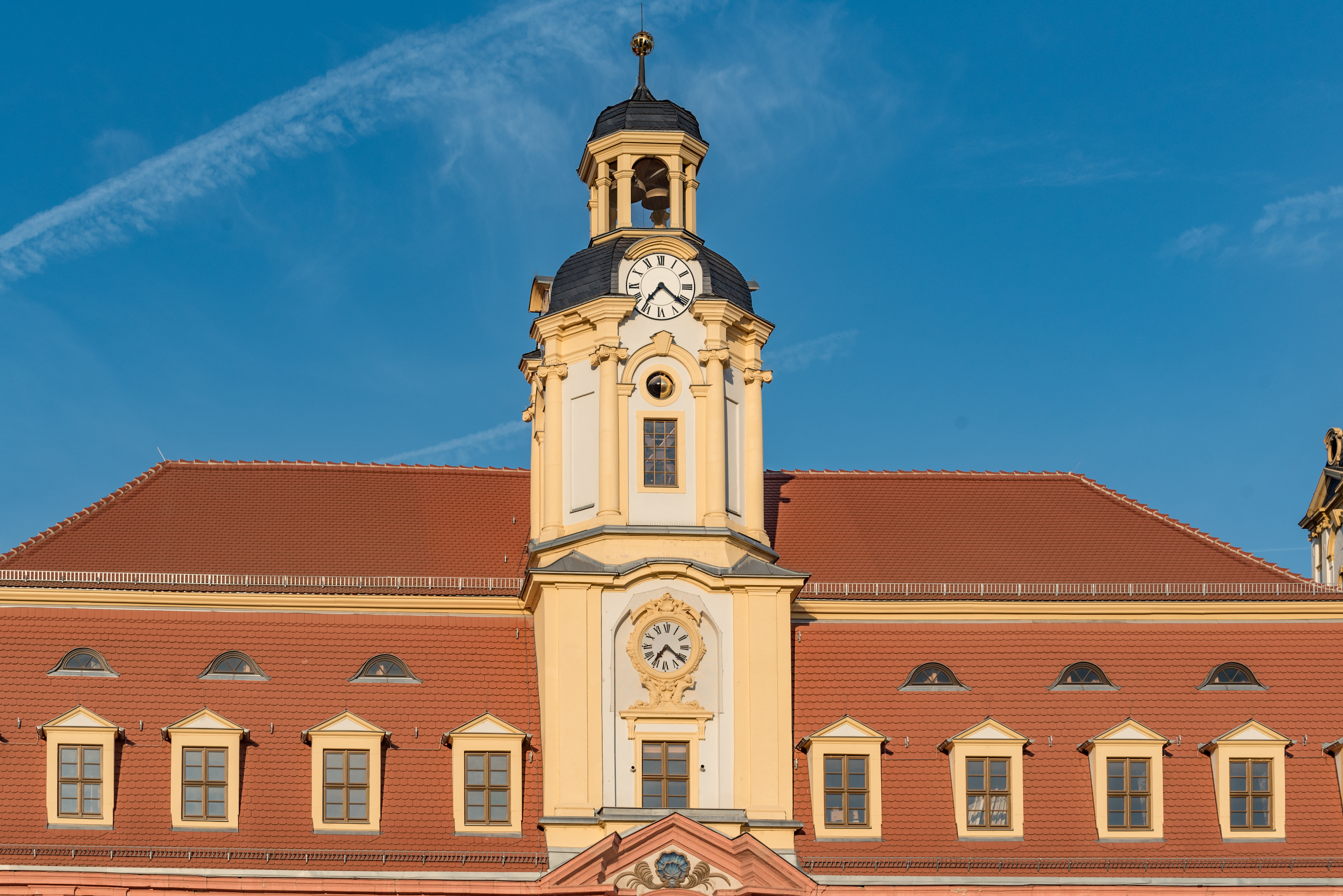 Weißenfels, Markt 1